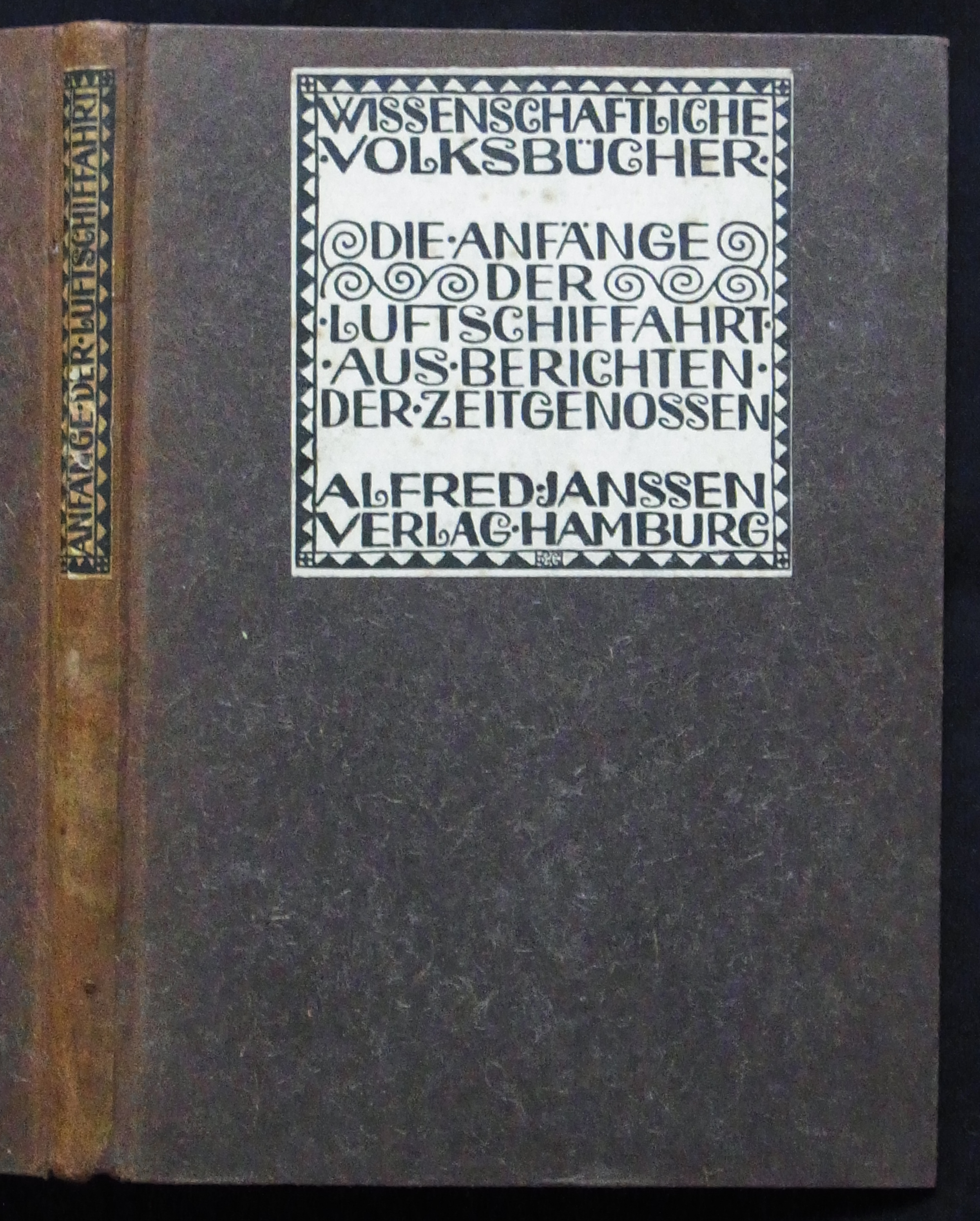 Gestaltung des Buchumschlags für die "Wissenschaftlichen Volksbücherei" des Verlages Alfred Janssen - gestaltet und im unteren Rahmen monogrammiert von Carl Otto Czeschka - Hamburg 1910